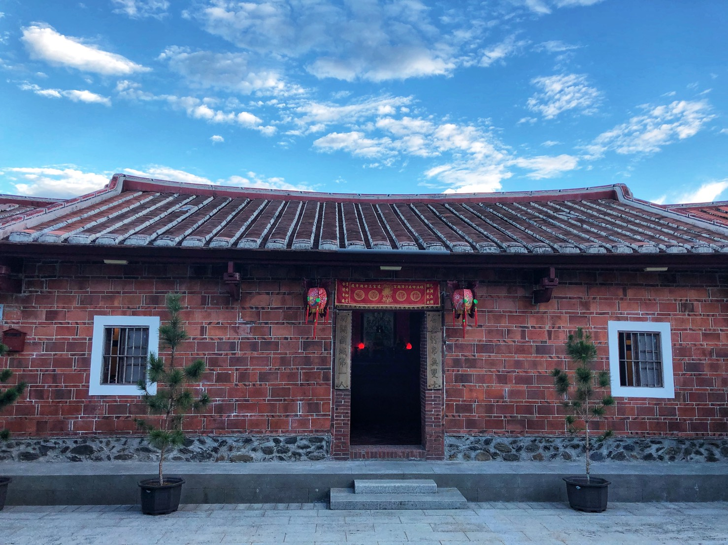 吳沙故居照片